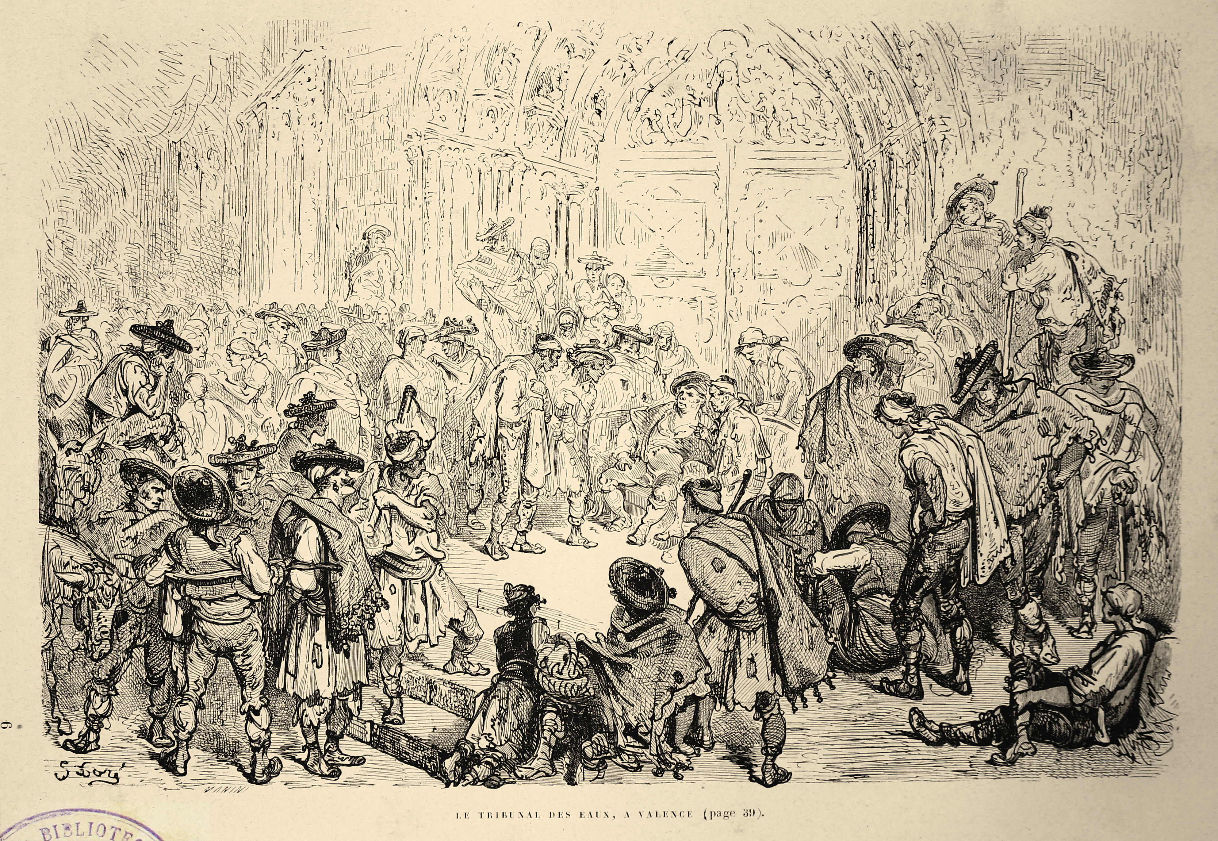 Autor: Davillier, Jean Charles, barón, 1823-1883 Descripción bibliográfica: L'Espagne / par Le Baron CH. Davillier ; ilustrée de 309 gravures dessinées su bois par Gustave Doré. - Paris : Librairie Hachette, 1874. - 799 p. : il. Materia: España- Geografía Materia: España- Usos y costumbres Ilustrador: Doré, Gustave, 1832-1883 Editor: Libreria Hachette Lugar de impresión: Francia, París Localización: Libro completo